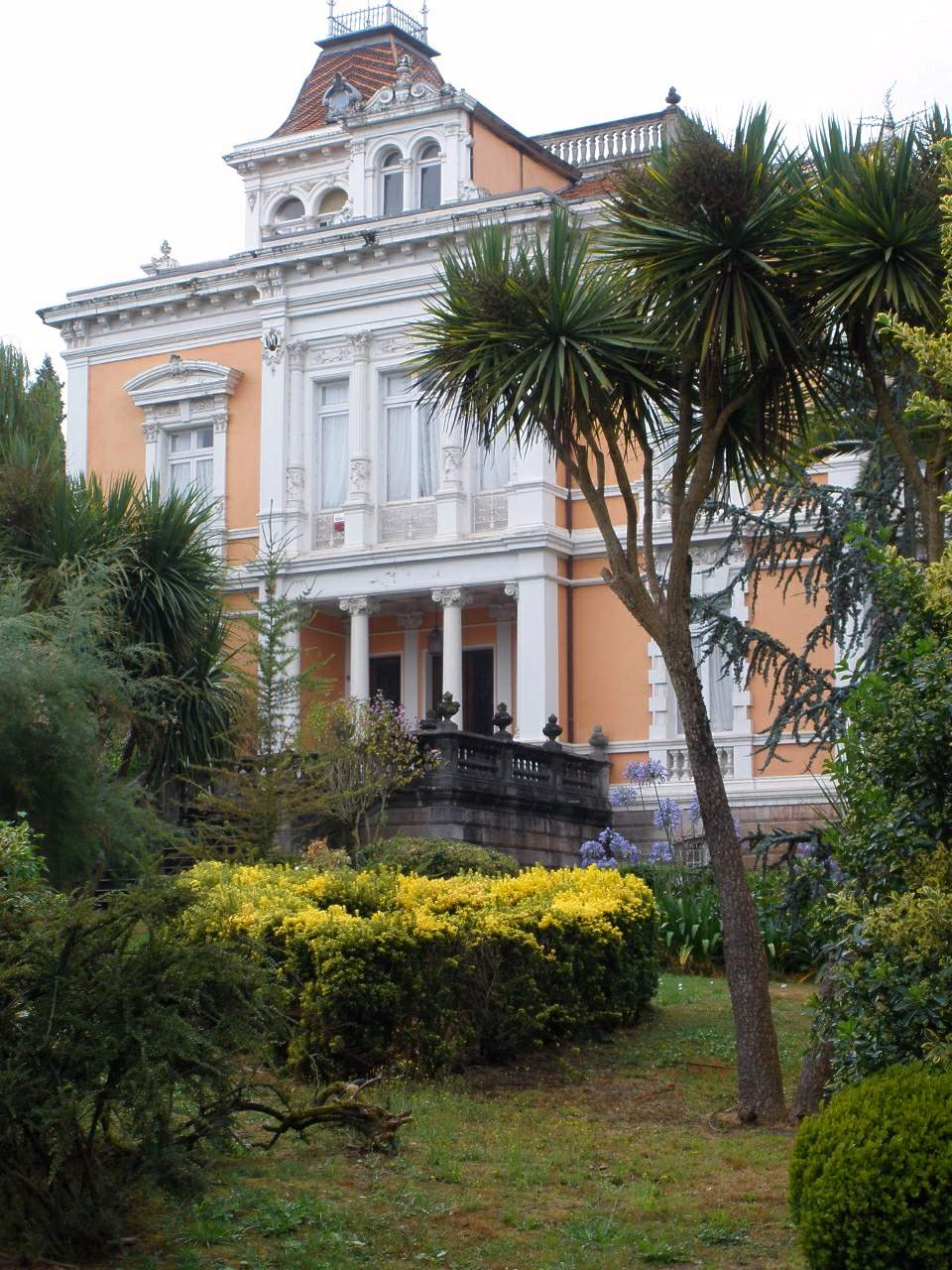 Grado (Asturias) - Palacete Velázquez (El Capitolio)